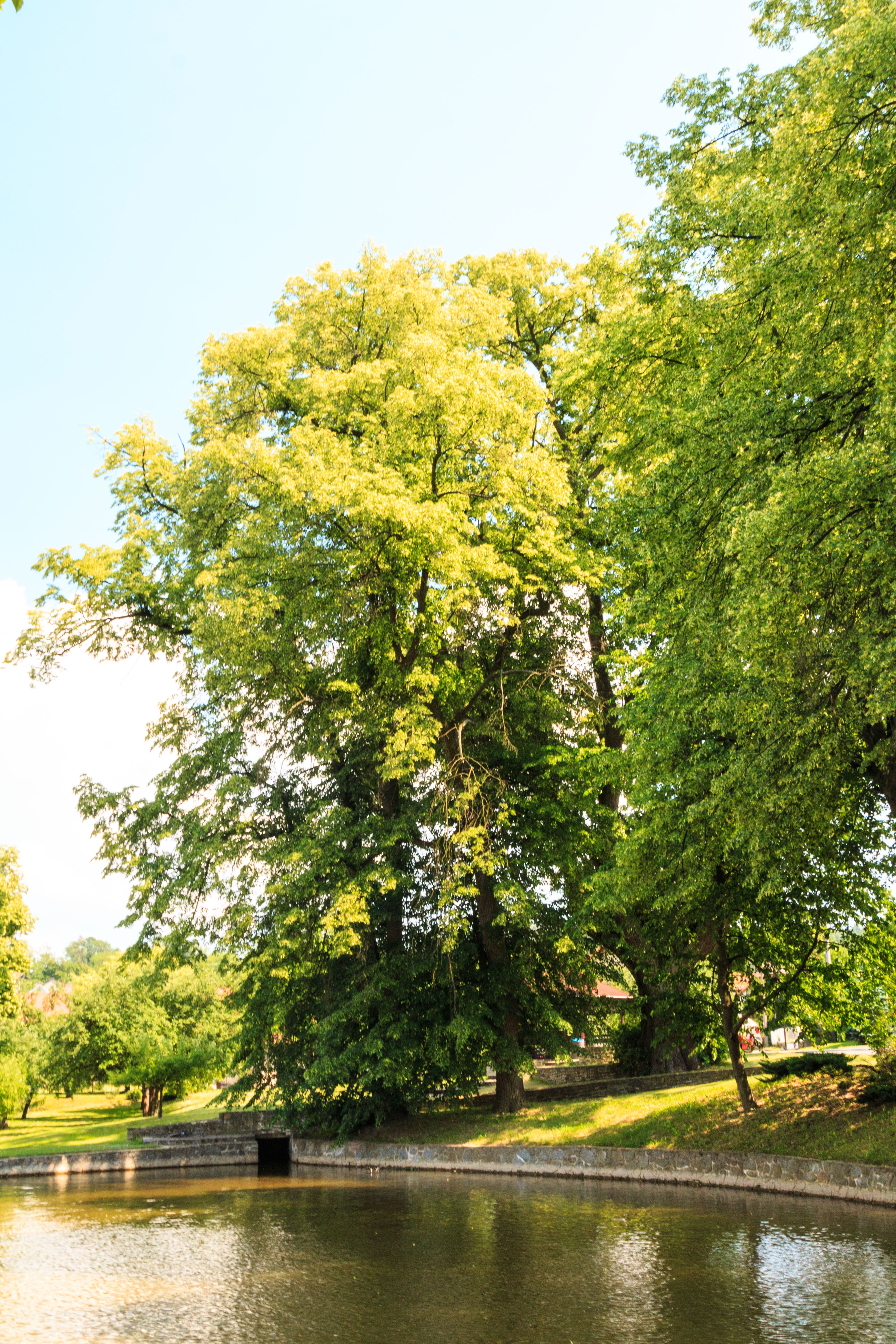 Farský rybník (Přepychy)